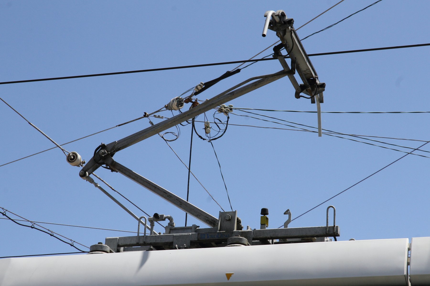 豊橋鉄道モ800形801の集電装置・PT7120-A形シングルアームパンタグラフ